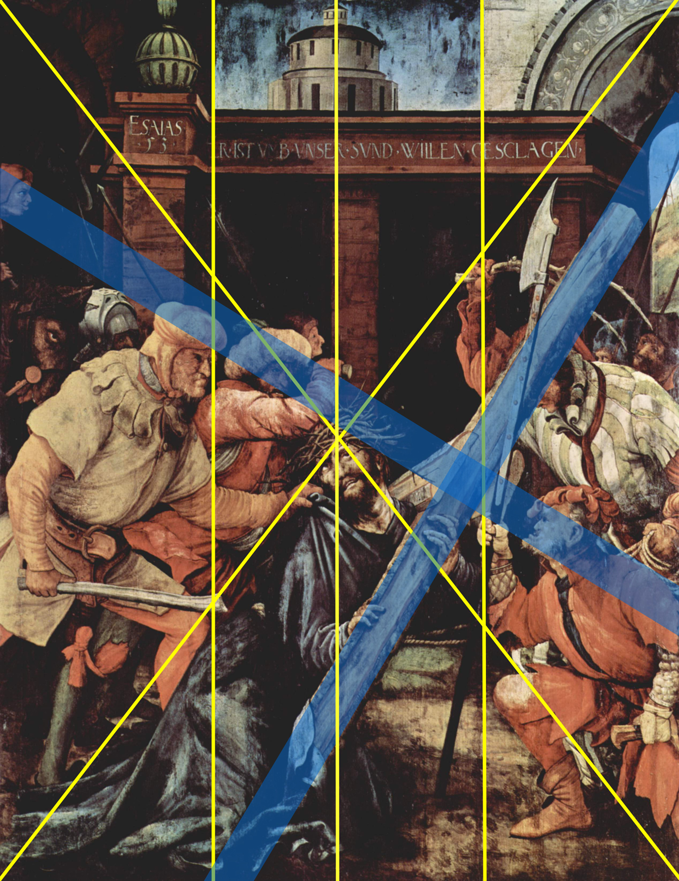 Matthias Grünewald: Kreuztragung, Tauberbischofsheimer Altar. Formaler Bildaufbau, Bilddiagonalen und Achsen